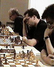 Schacholympiade 2000 in Istanbul, Runde 12: USA - Deutschland (Robert Hübner, Christopher Lutz und Klaus Bischoff).